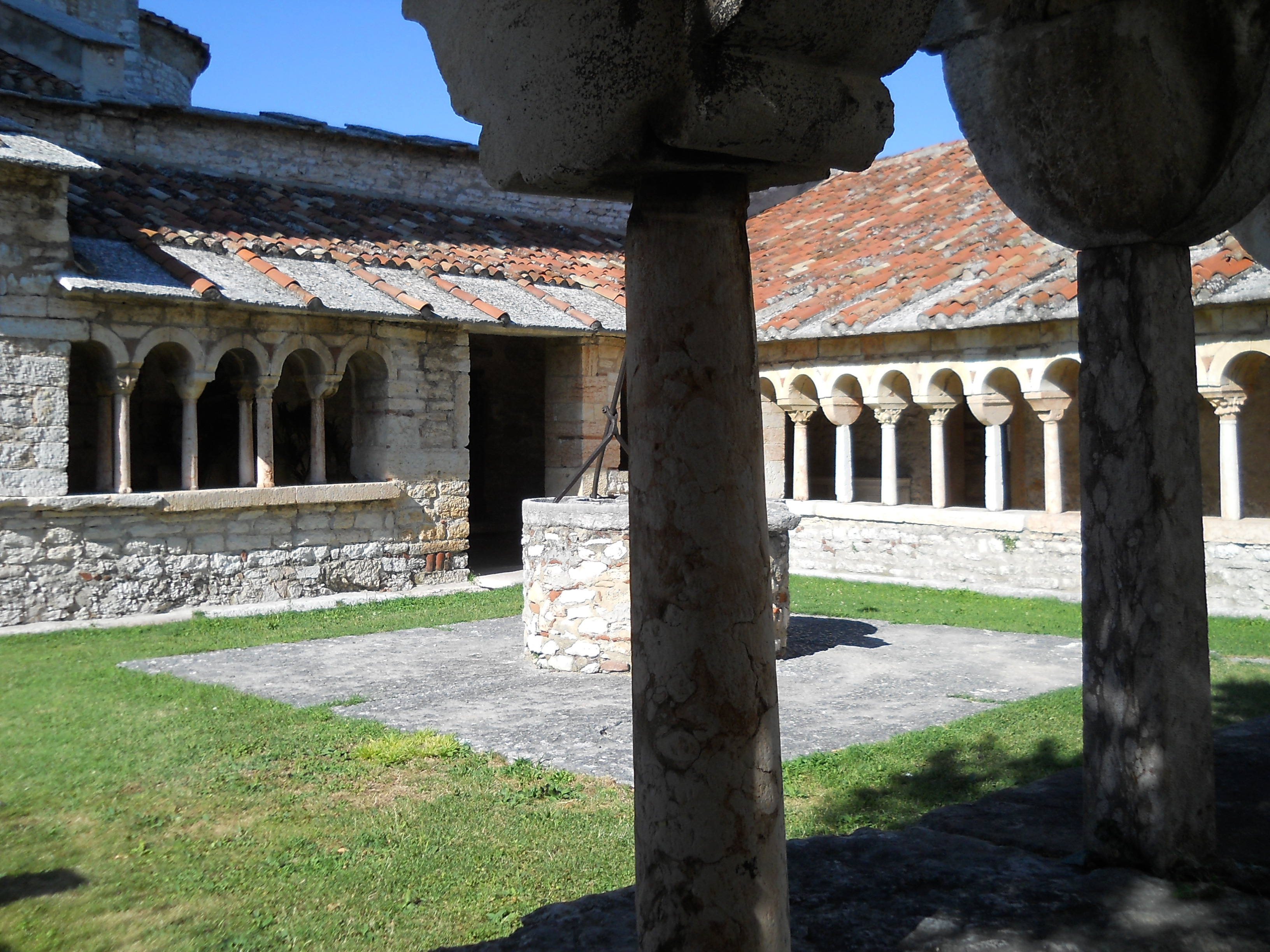 Esterno della Pieve di San Giorgio di Valpolicella. Colonnato del chiostro adiacente